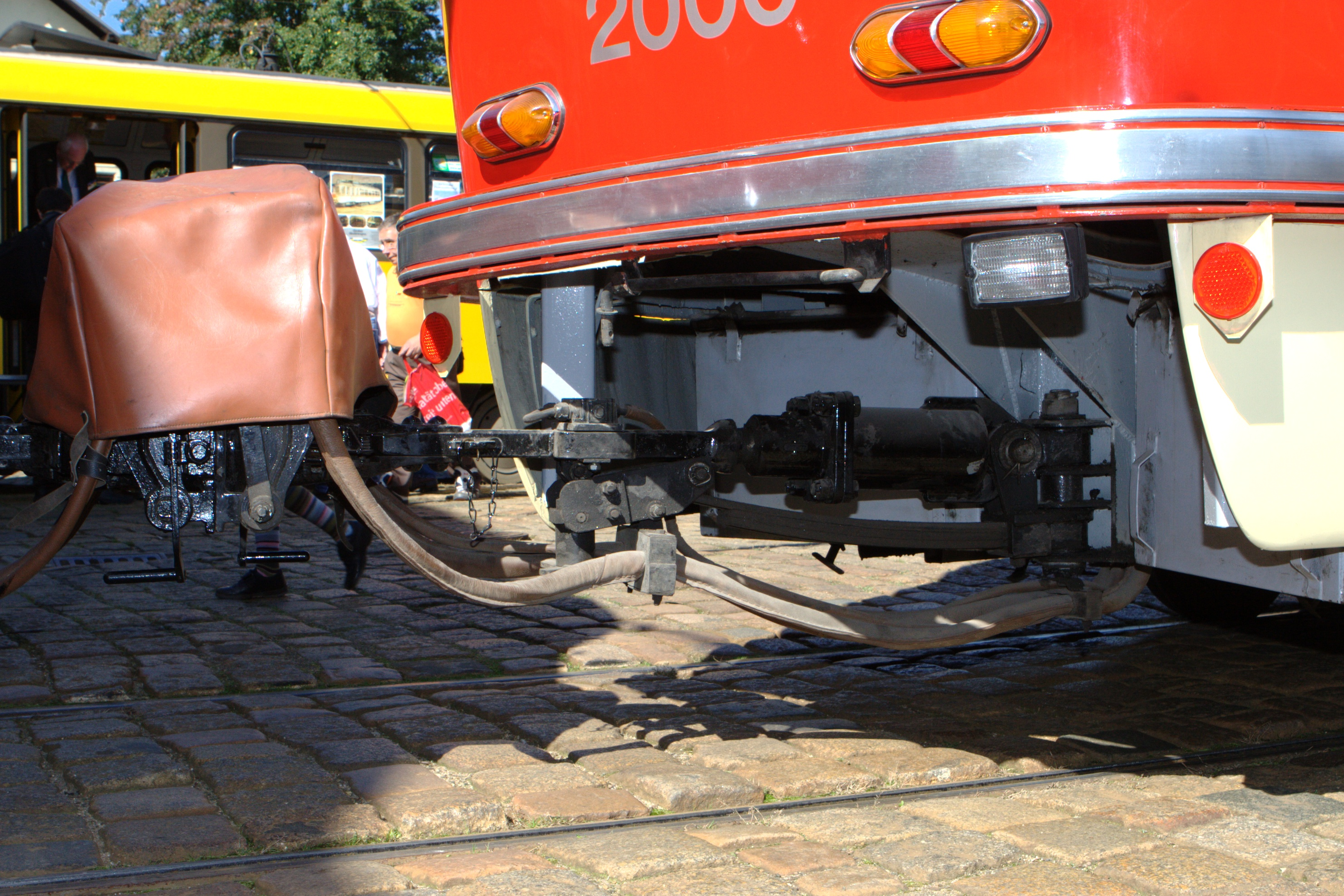 Kupplung einer Tatra T4 Straßenbahn in Dresden